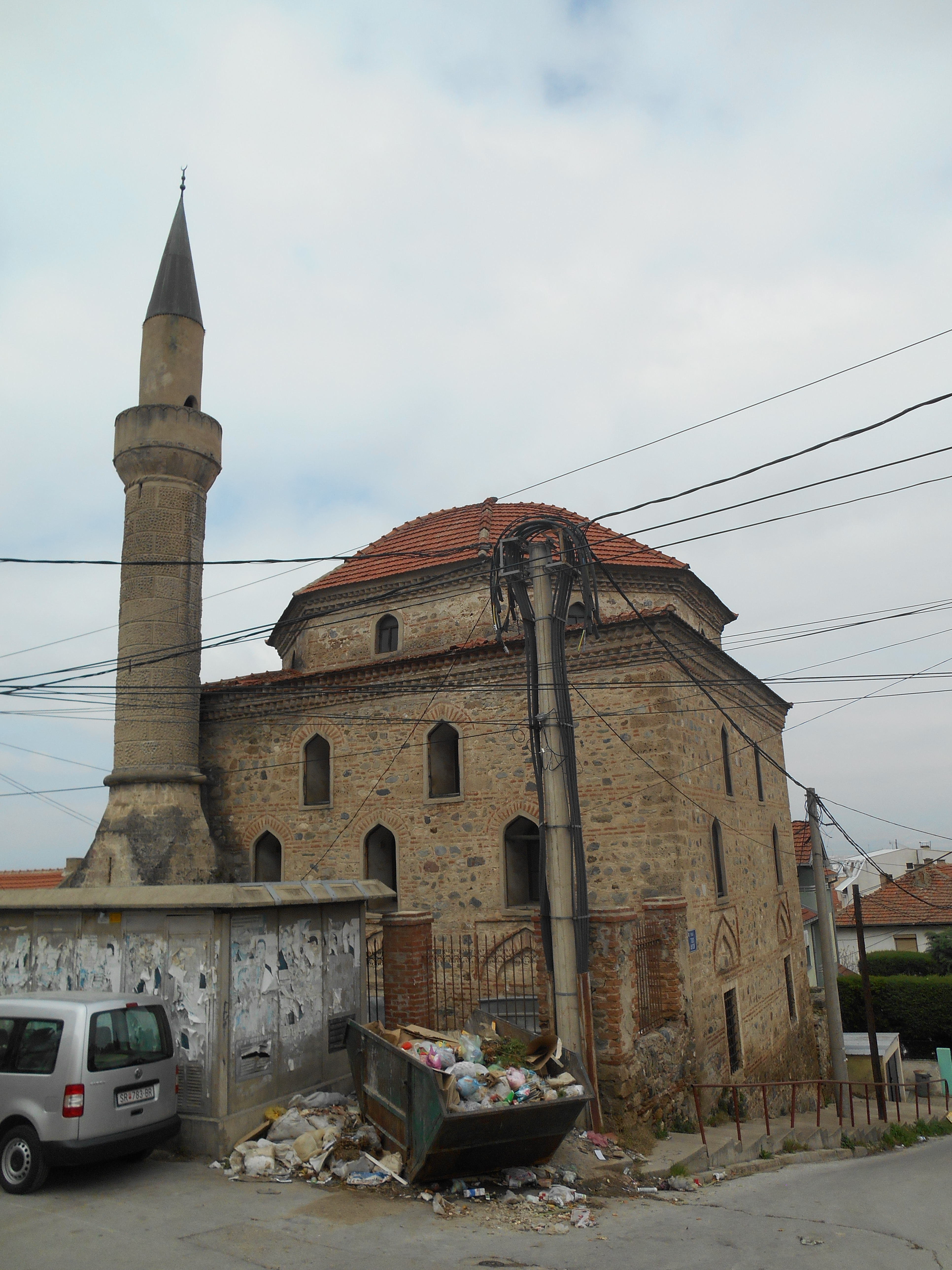 Орта џамија